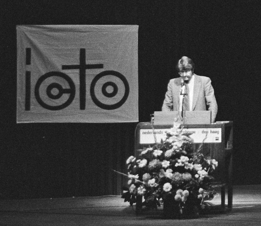 Collectie / Archief : Fotocollectie Anefo Reportage / Serie : Congres "Vrede en Veiligheid" in Den Haag Beschrijving : Congresleden en een spreker in de zaal Datum : 25 september 1982 Locatie : Den Haag, Zuid-Holland Trefwoorden : congressen, forumleden, sprekers Fotograaf : Dijk, Hans van / Anefo Auteursrechthebbende : Nationaal Archief Materiaalsoort : Negatief (zwart/wit) Nummer archiefinventaris : bekijk toegang 2.24.01.05 Bestanddeelnummer : 932-3423